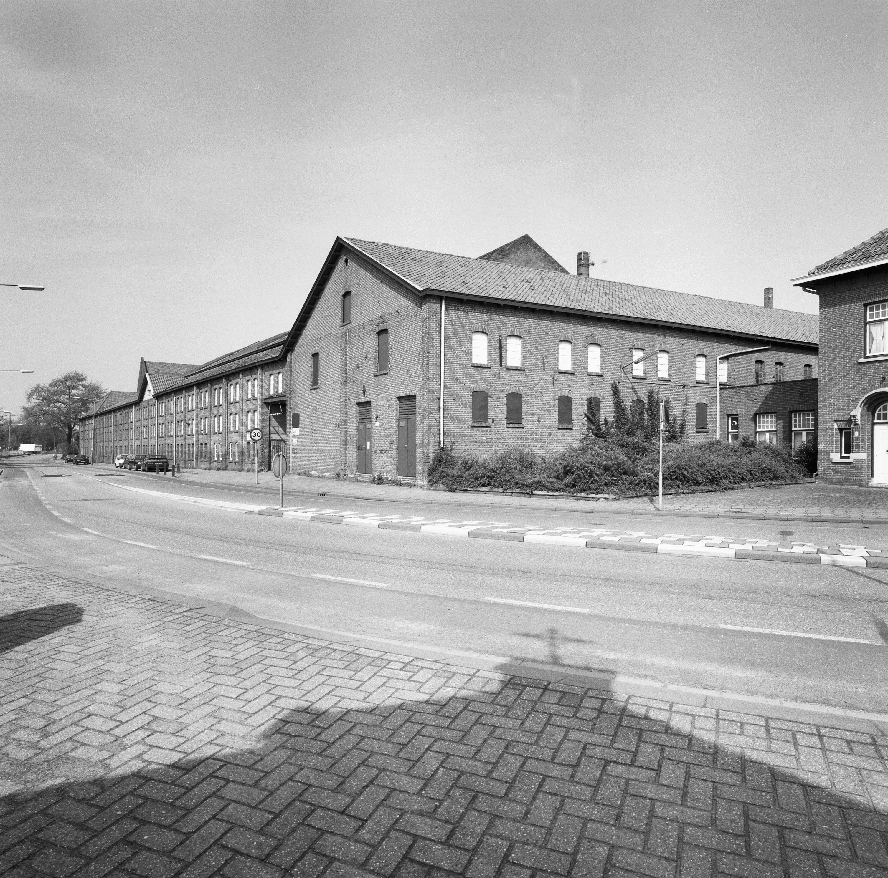 Dakpannen- En Kleiwarenfabriek De Valk: Overzicht voorgevel langs de Aasterbergerweg en rechter zijgevel (opmerking: Gefotografeerd voor Monumenten In Nederland Limburg)